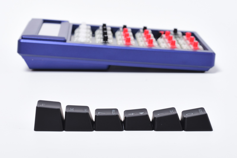 ducky-pocket-15